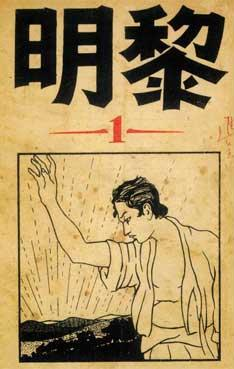 한국의 잡지 여명지, 1925년 7월호